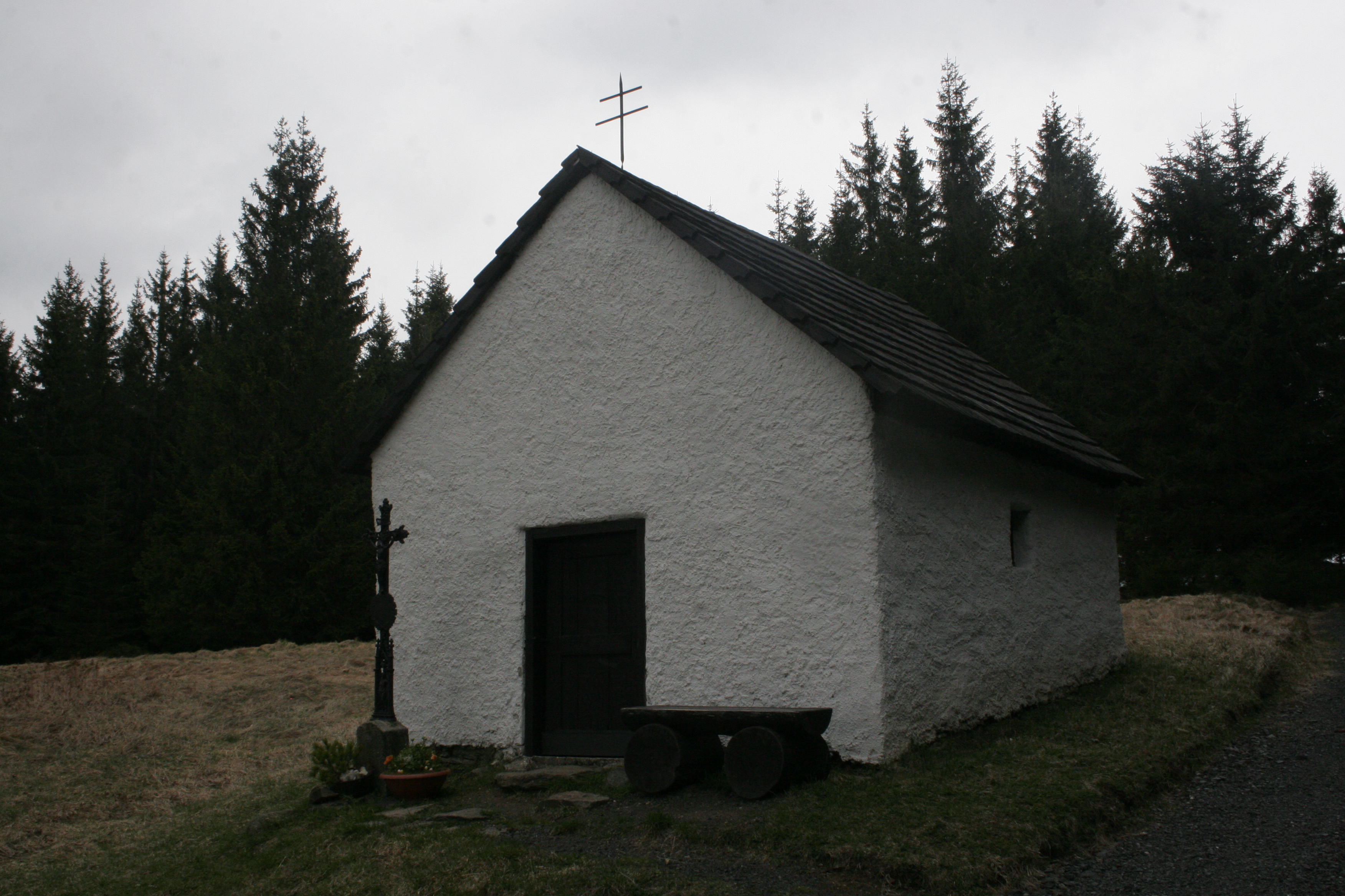 Přírodní rezervace Městišťské rokle. Okres Klatovy, Česká republika.